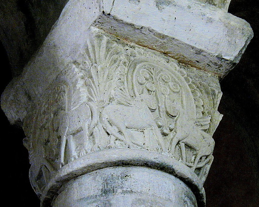 Vignory - Eglise Saint-Etienne - Chapiteau du déambulatoire